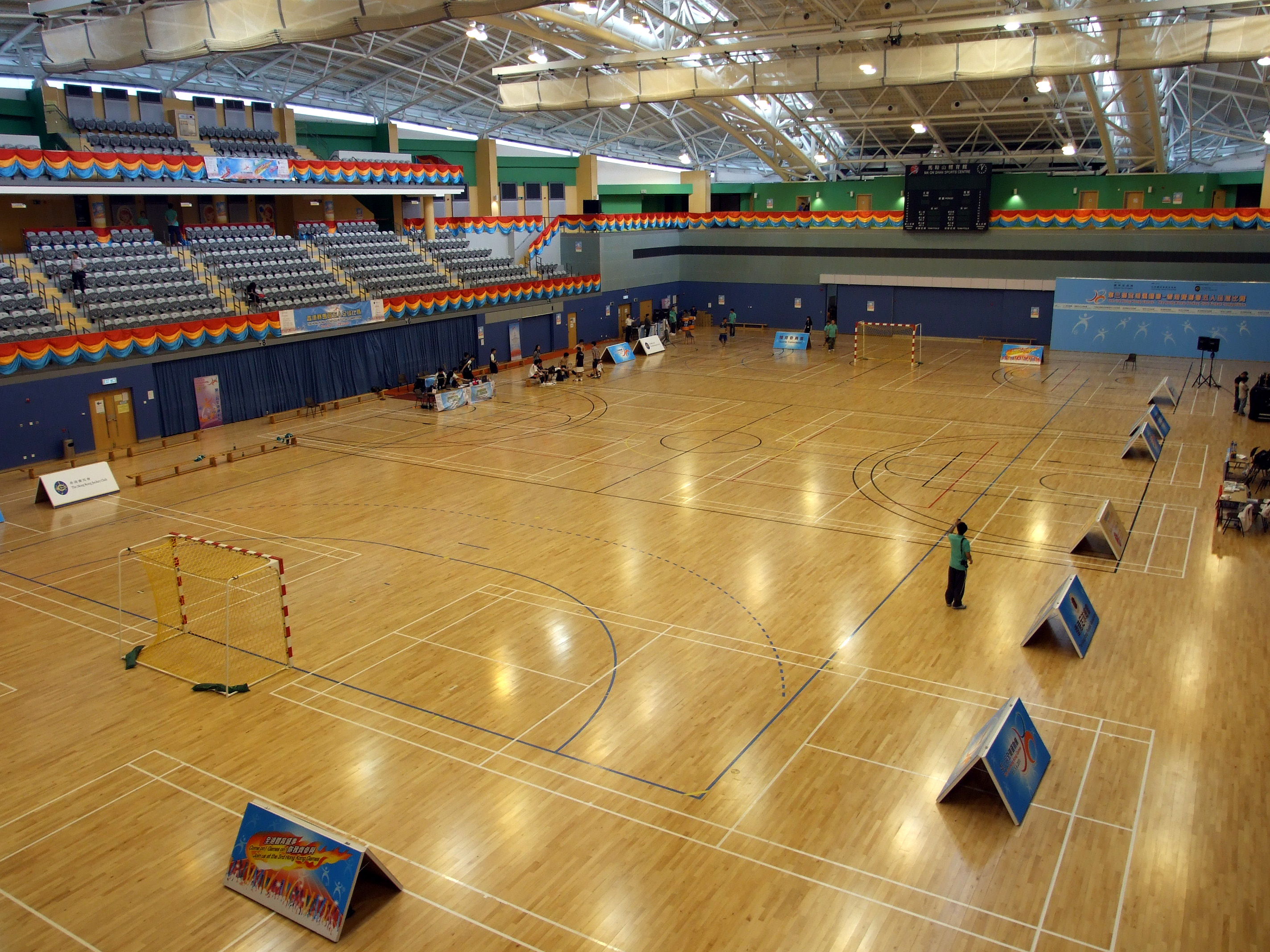 中文（香港）: 馬鞍山體育館內觀